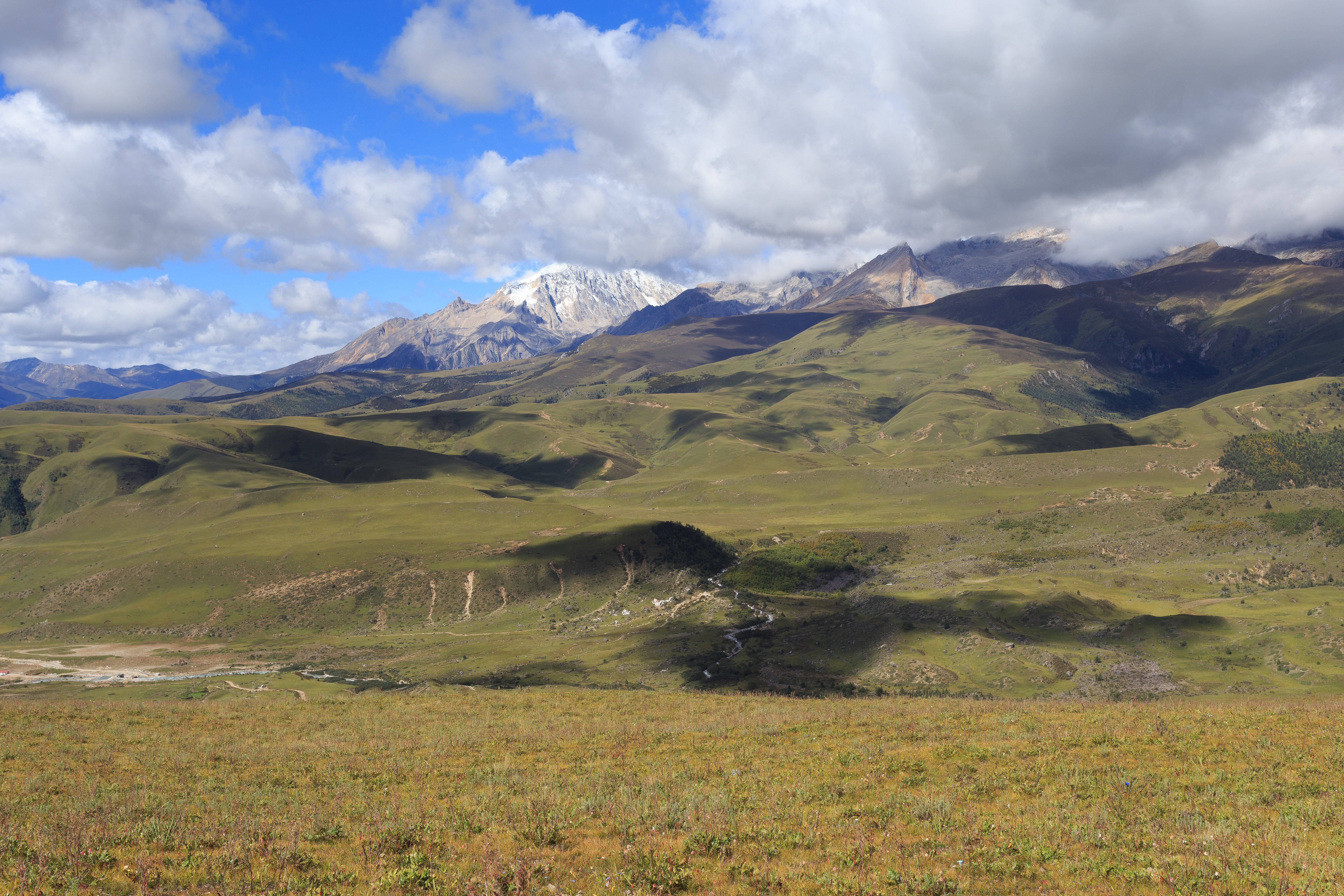 格聂峰，位于中国四川省甘孜州理塘县，摄于喇嘛垭乡北部垭口